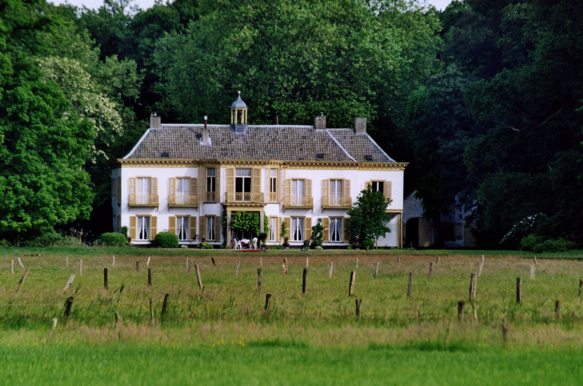 Huize Hondsdonk te Ulvenhout.